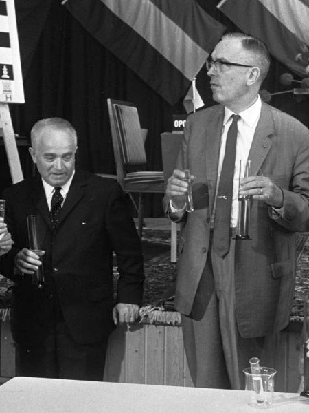 Réti Herdenkingstoernooi: internationale schaakvierkamp 1969. Loting met reageerbuisjes; v.l.n.r. Salo Flohr (Rusland), Max Euwe (Nederland).